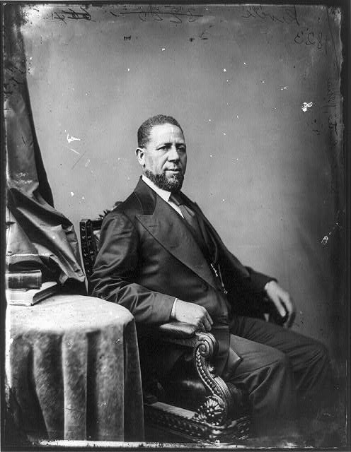 Hiram Rhoades Revels REVELS, HIRAM. Photograph. [Between 1870 and 1900.] Location: Biographical File Reproduction Number: LC-USZ62-98798; LC-BH8301-1823